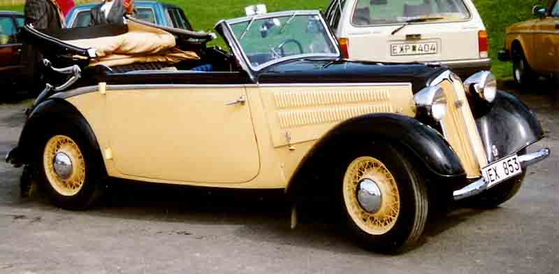 DKW Front Luxus Type F8 700 Cabriolet 1939